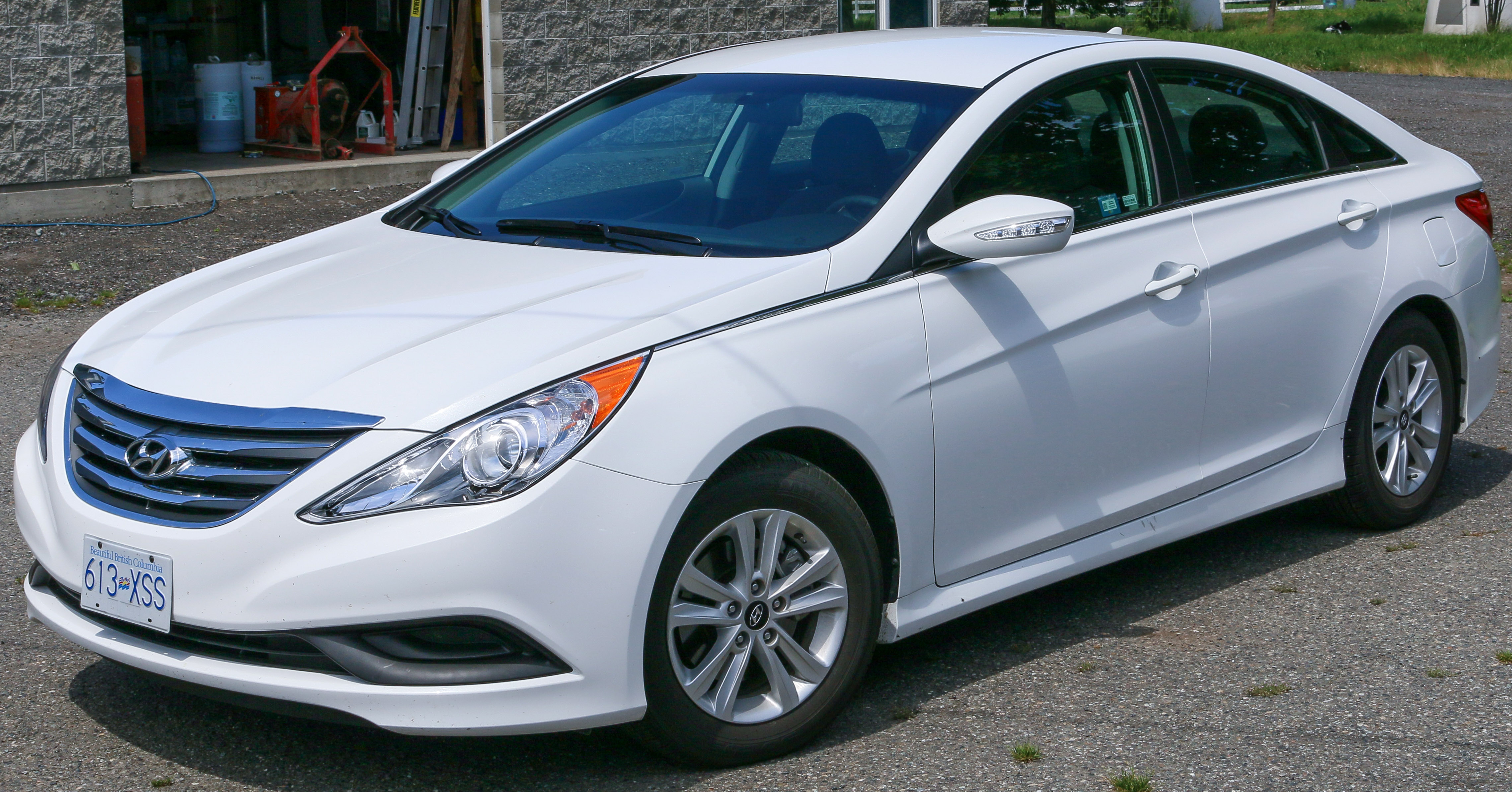 Hyundai Sonata GLS in Canada